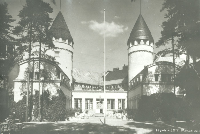 Valokuva 1930-luvulta Hyvinkään parantolasta, arkkitehti Lars Sonck